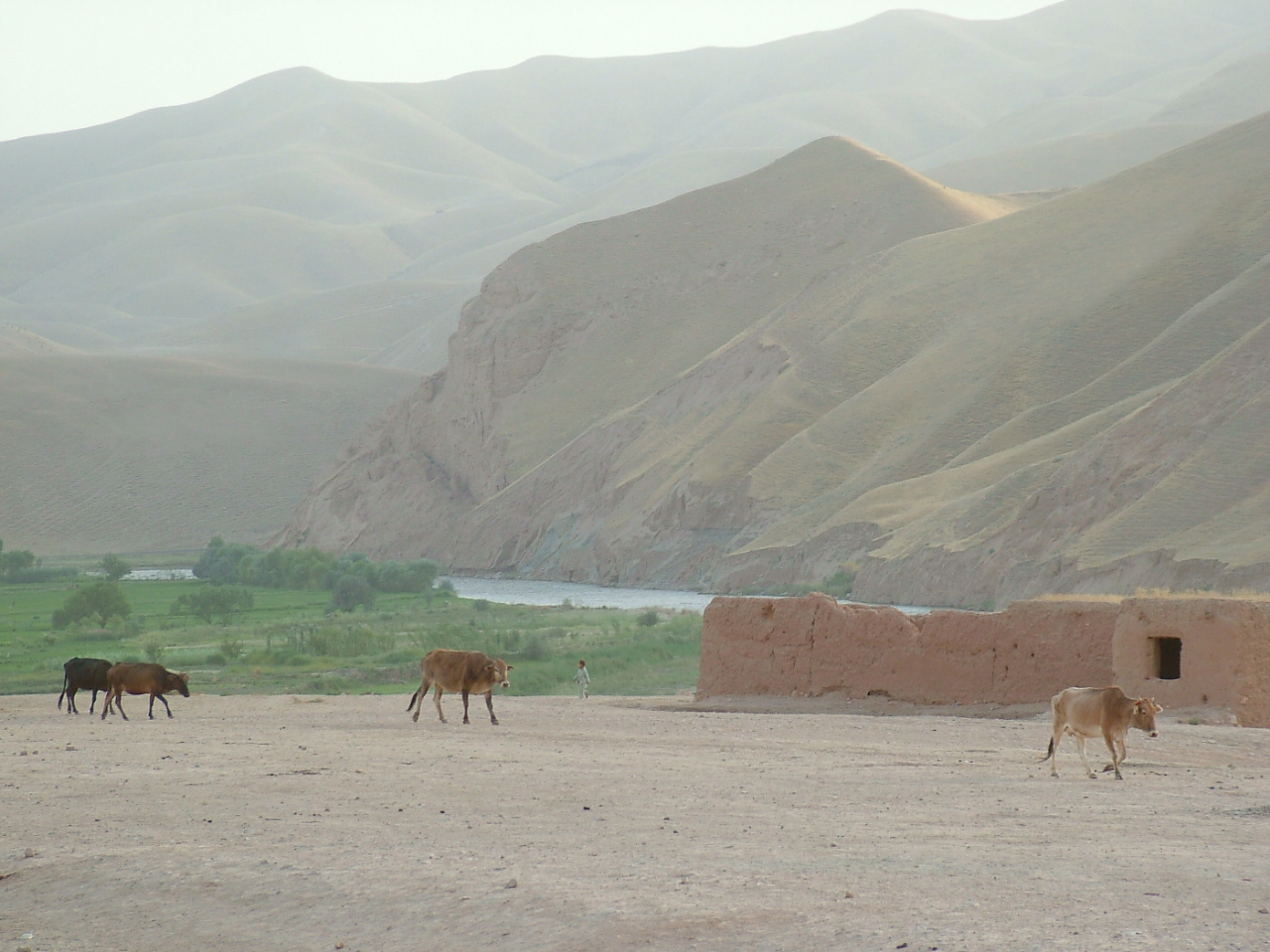 bei Kunduz